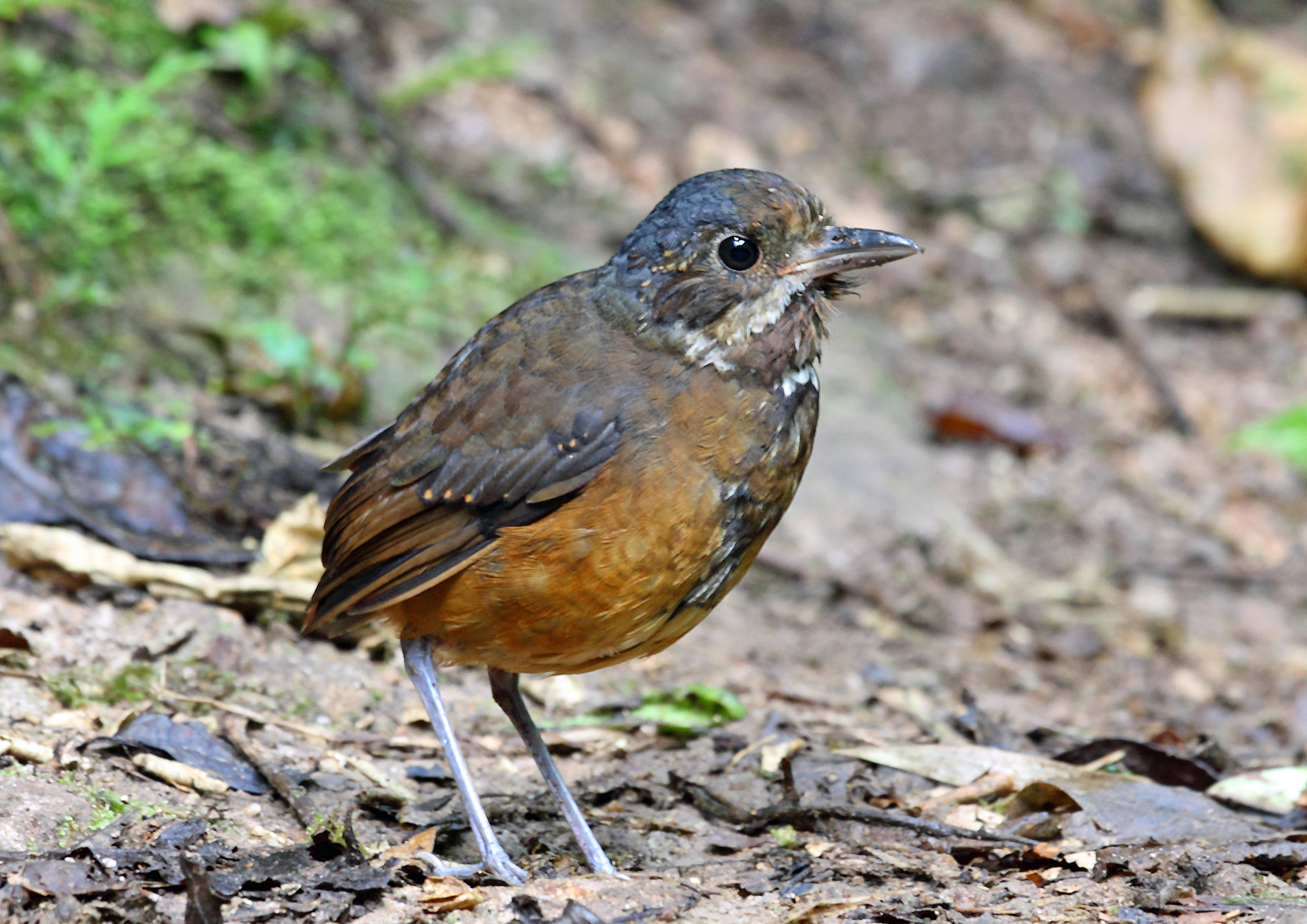 Moustached Antpitta, Paz de las Aves, Ecuador